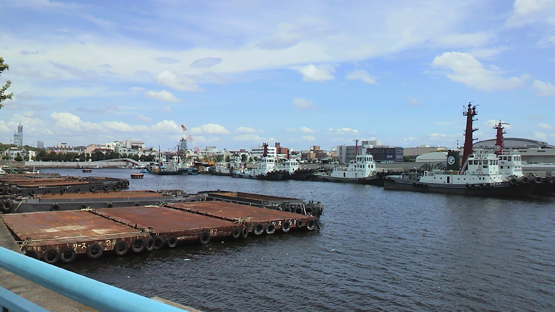 大正内港。マリンテニスパーク・北村付近より撮影。